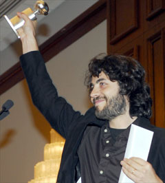 Il s'agit d'une photo de Noël Mitrani au festival de Toronto en 2006 prise par sa femme Véronique Mitrani.